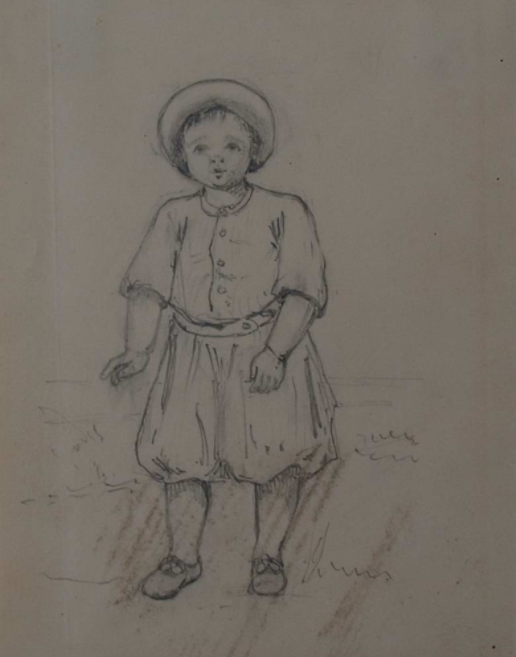 Портрет Оли Чертковой. Рисунок. 1890-е Материал, техника: Бумага, карандаш Размер: 14,2 х 11 Место создания: — Номер в Госкаталоге: 8530335 Номер по ГИК (КП): МЯ 152 Инвентарный номер: Г-36 (Государственное бюджетное учреждение культуры Ставропольского края "Мемориальный музей-усадьба художника Н.А. Ярошенко")